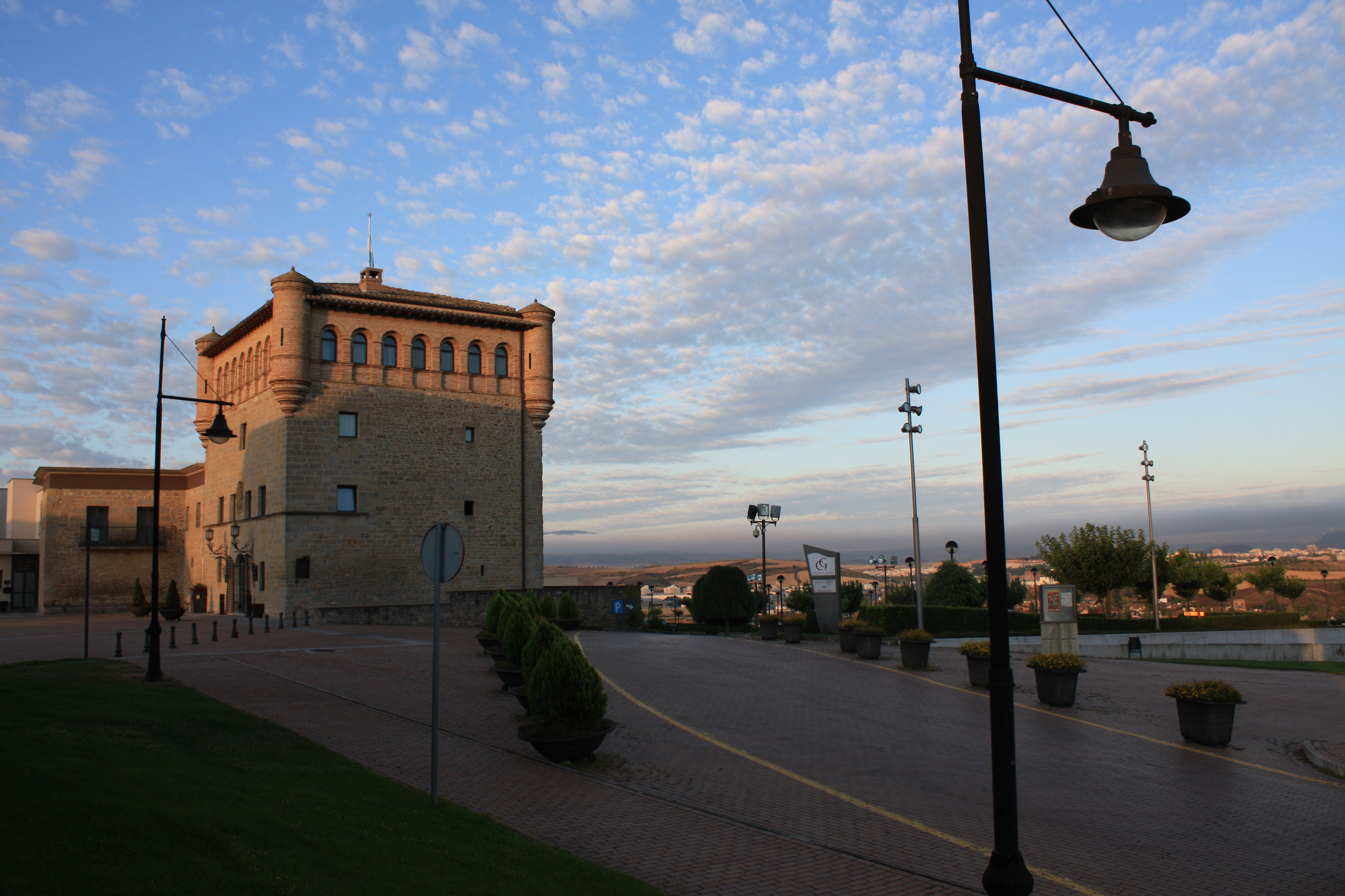 Plaza del Palazio de Gorraiz, Pamplona (ES)